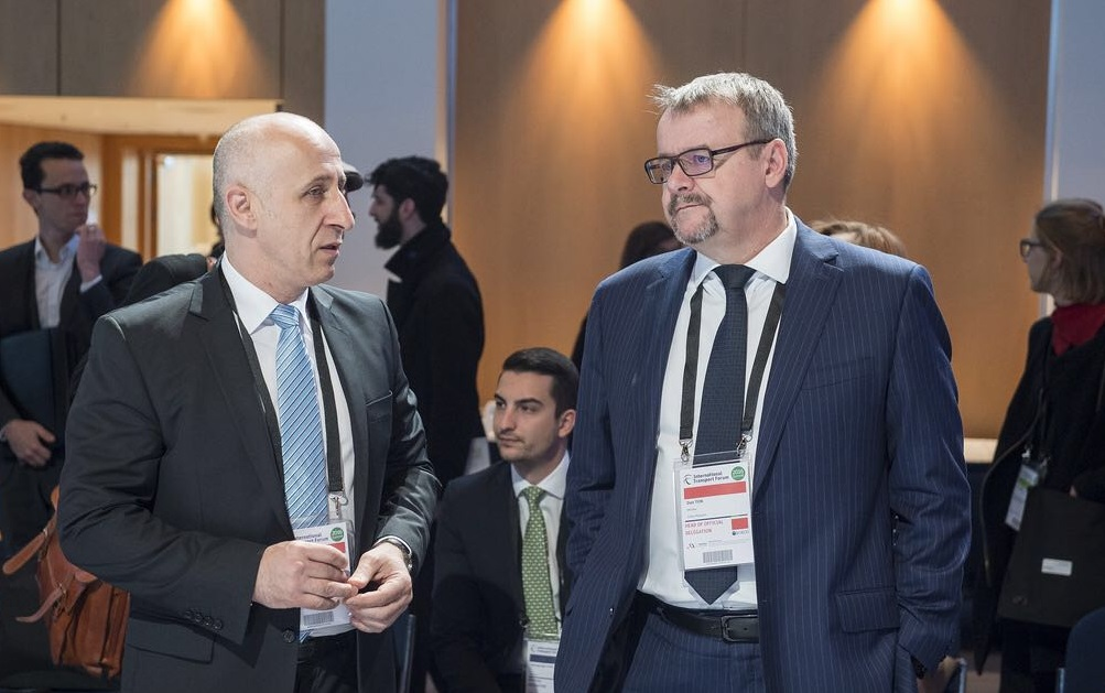 Cu ministrul ceh al transporturilor, Dan Tok, după semnarea scrisorii pentru protejarea transportatorilor central și est-europeni